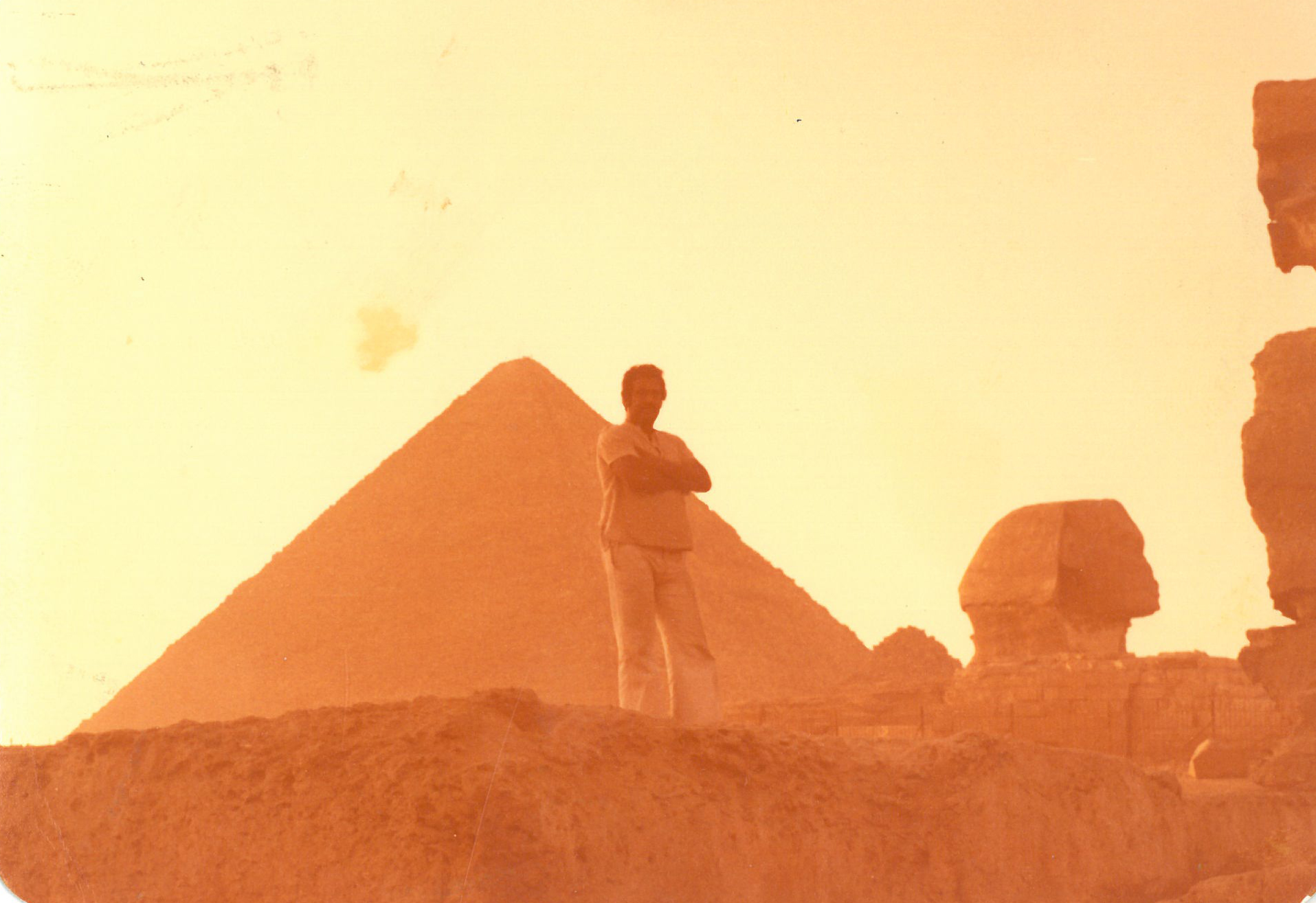 فیلم اسد سینا در مصر